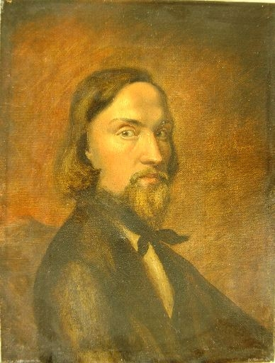 Selbstportrait Gaudenz Taverna; 19 x 25